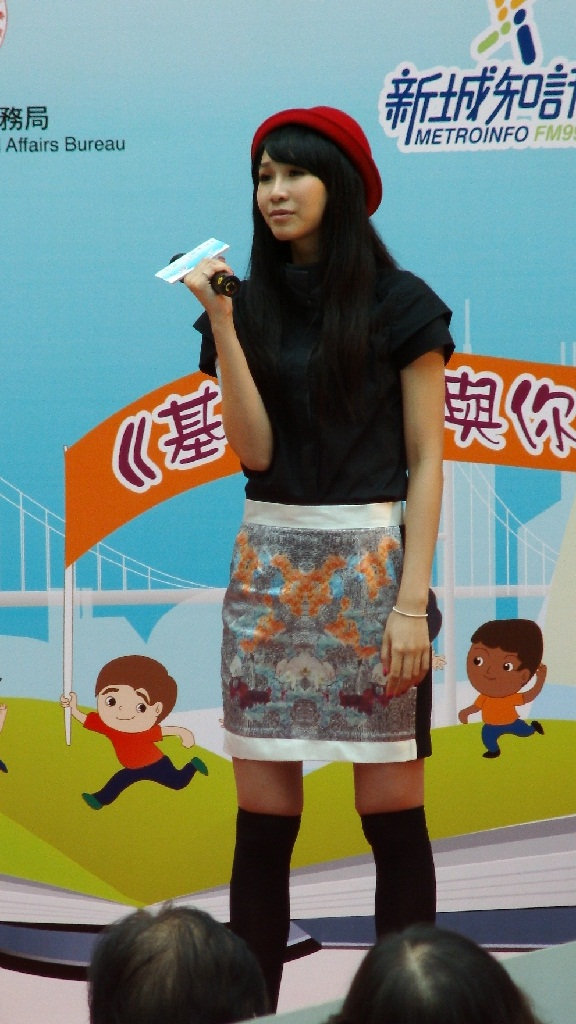 中文（香港）: 麥貝夷的樣子